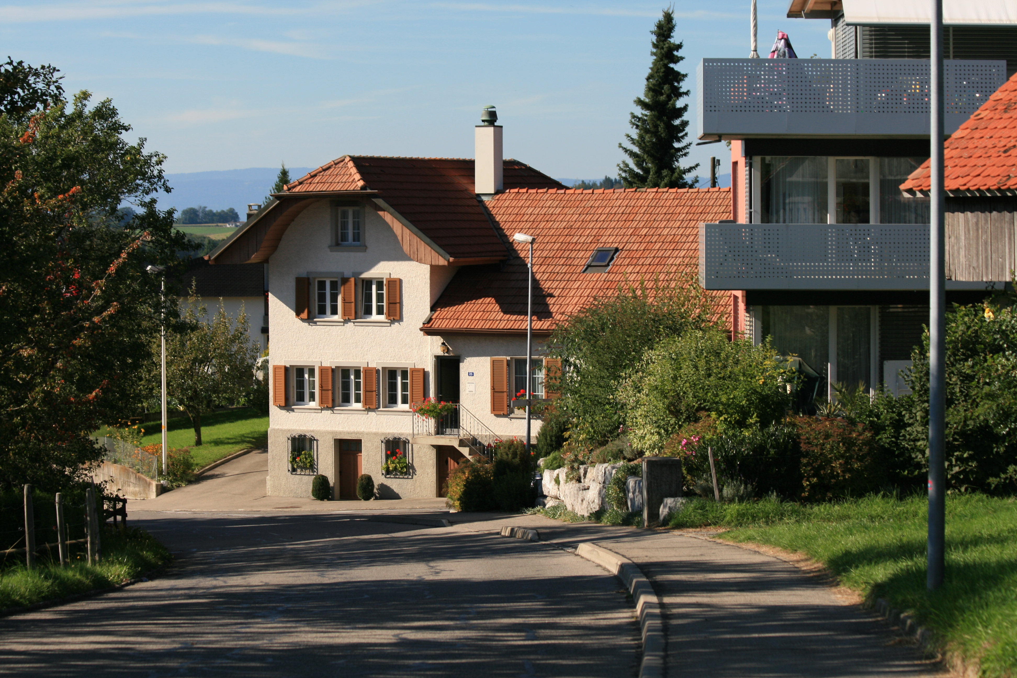 Haus in Giffers, Kanton Freiburg, Schweiz